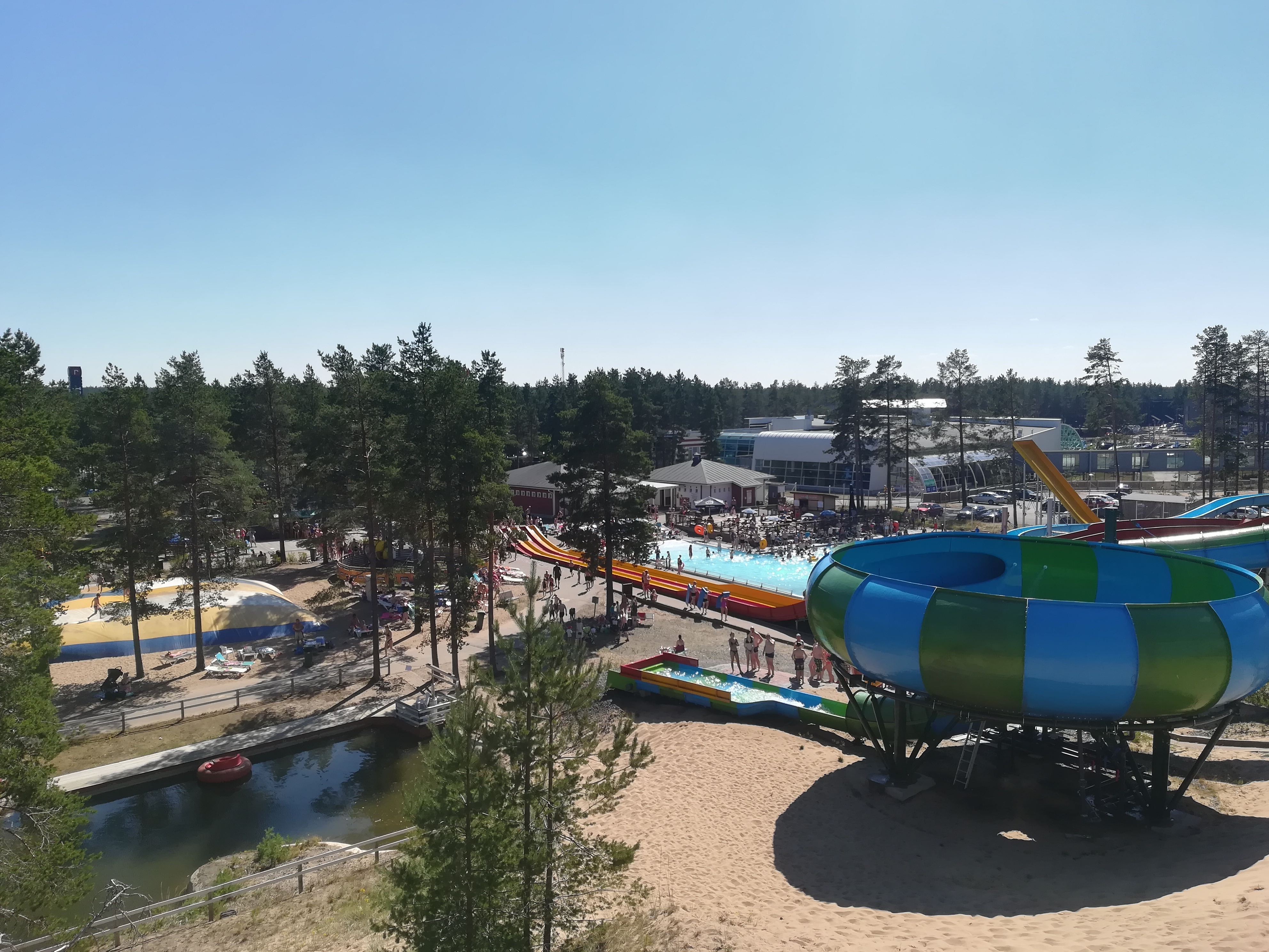 Kalajoen Jukupark heinäkuussa 2018.